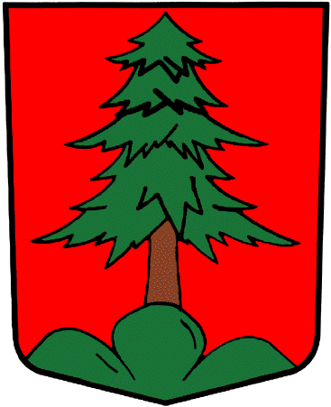 Wappen von Veysonnaz Kanton Wallis Schweiz